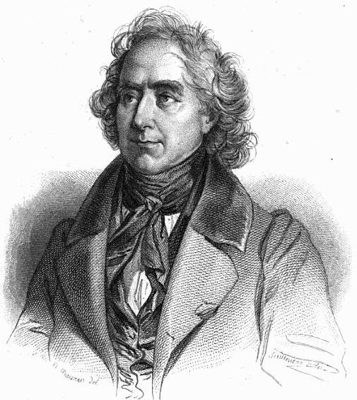 "François Dominique Arago"